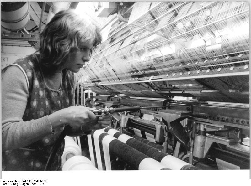 ADN-ZB-Ludwig-28.4.76-Bez. Erfurt: 50.000 Paar Strümpfe und Strumpfhosen zusätzlich zum Plan produziert Raschelstrickerin Edeltraud Göbel gemeinsam mit den anderen Werktätigen in der Strumpfwarenfabrik Diedorf des Kombinats ESDA. Diese Leistung um eine um 38% (38%) höhere Arbeitsproduktivität wurden durch die Verwirklichung eines Rationalisierungsobjektes im Produktionsbereich Wendehausen erreicht. Die Kollektive des bedeutendsten Produzenten von Kinderstrumpfhosen in der DDR bereiten so den IX. Parteitag der SED vor.